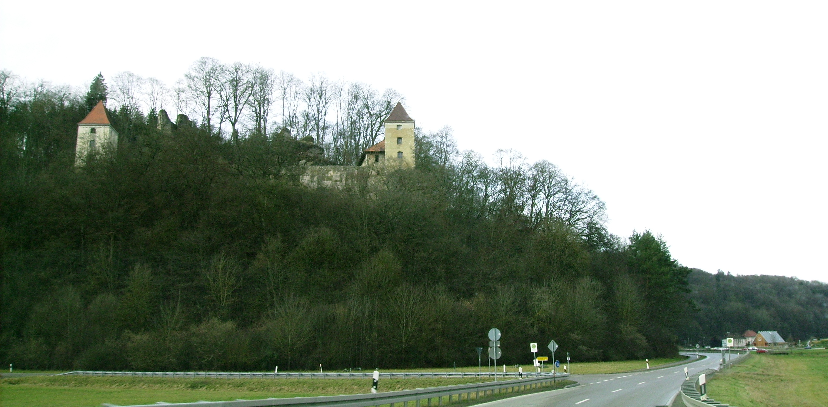 Photographer: Joe Quimby Description: Die zwei Vierecktürme der Kaltenburg